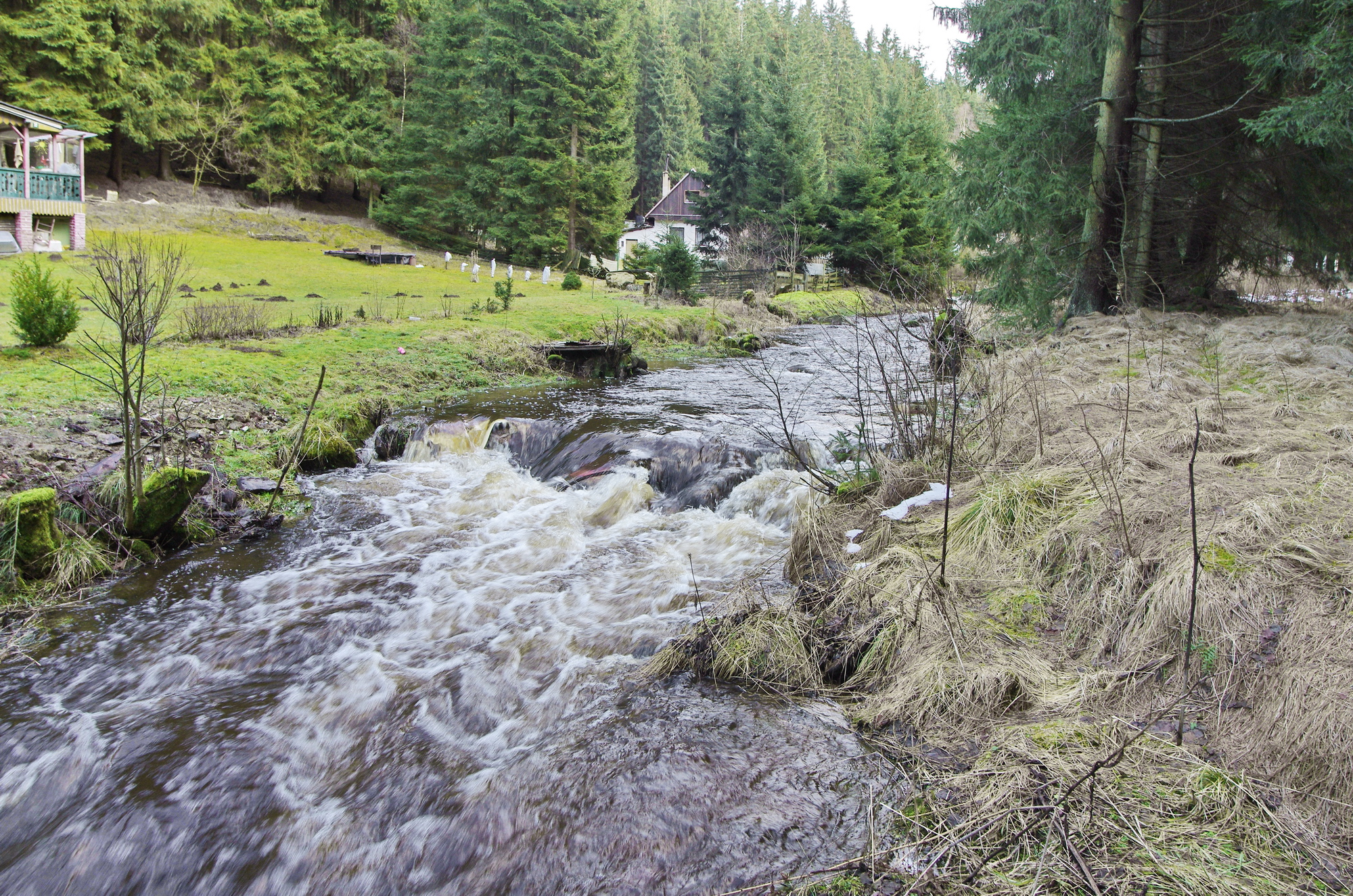 Lobezský potok, Slavkovský les u osady Podstrání, okres Sokolov